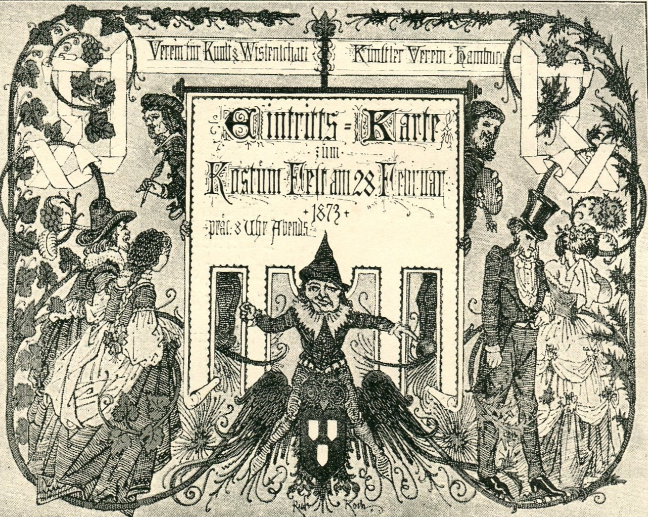 Eintrittskarte für ein Kostümfest des Vereins für Kunst und Wissenschaft Hamburg 1873